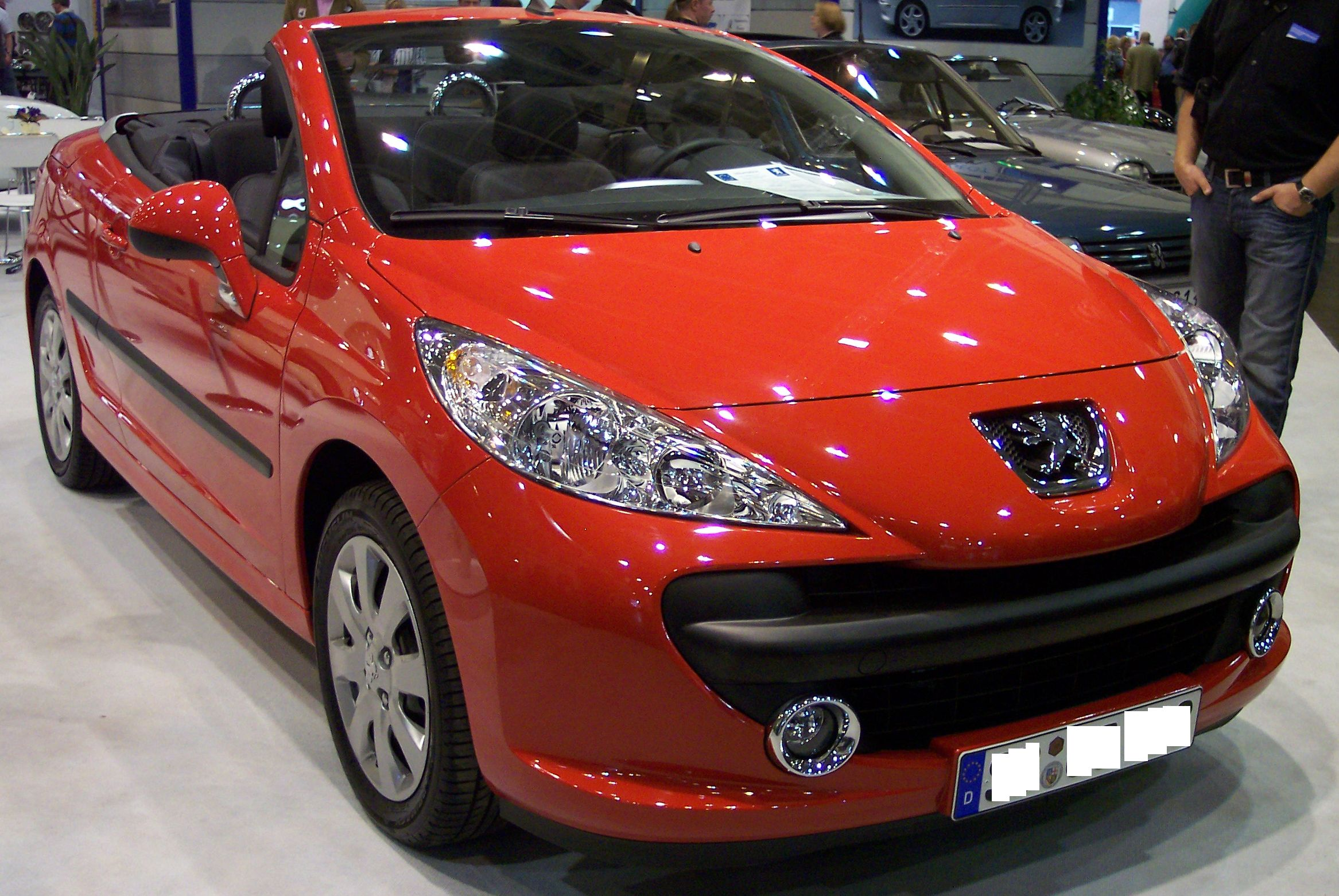 Peugeot 207CC 2007